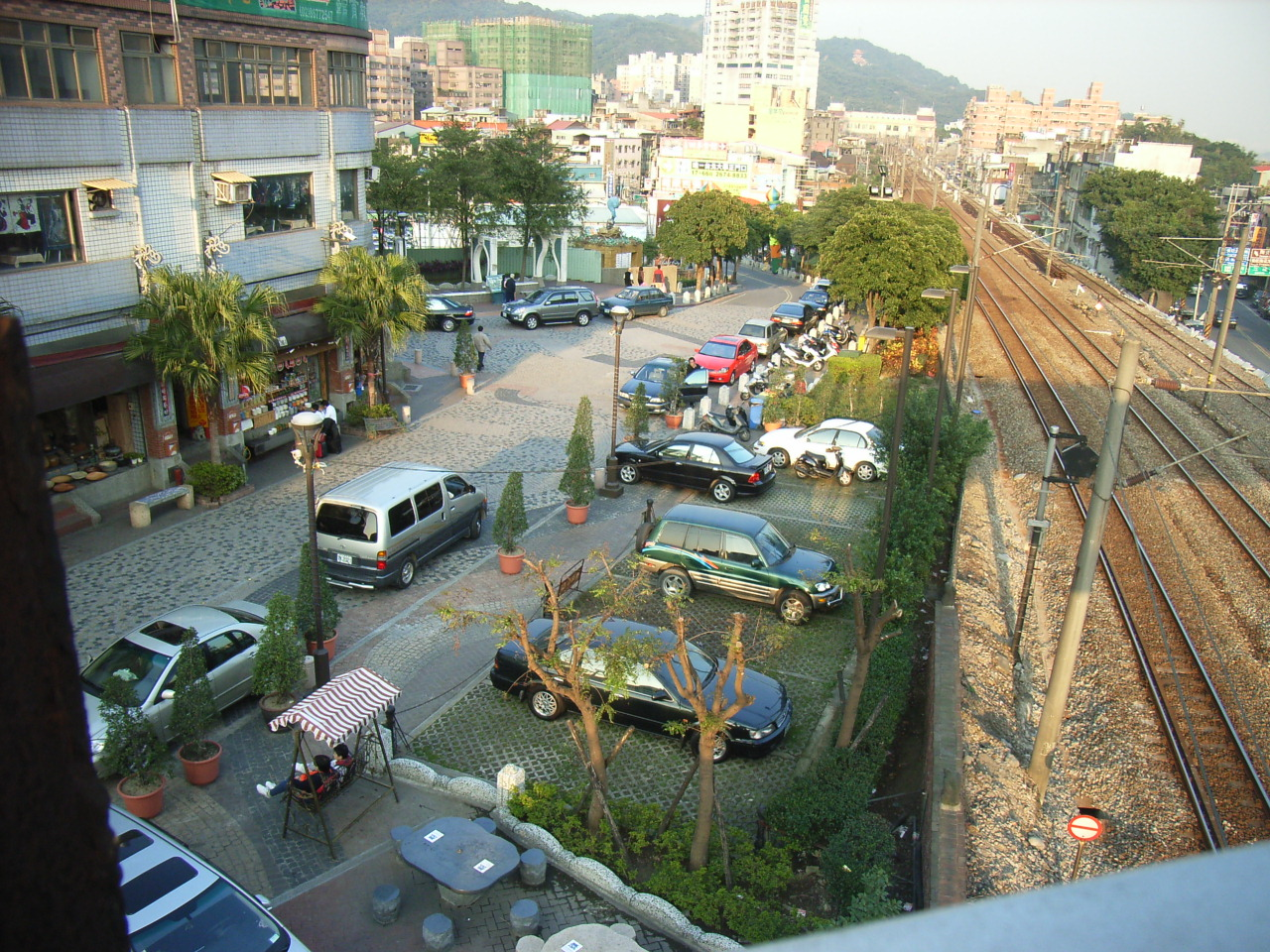 鶯歌陶瓷老街旁的戶外停車場與鐵路。